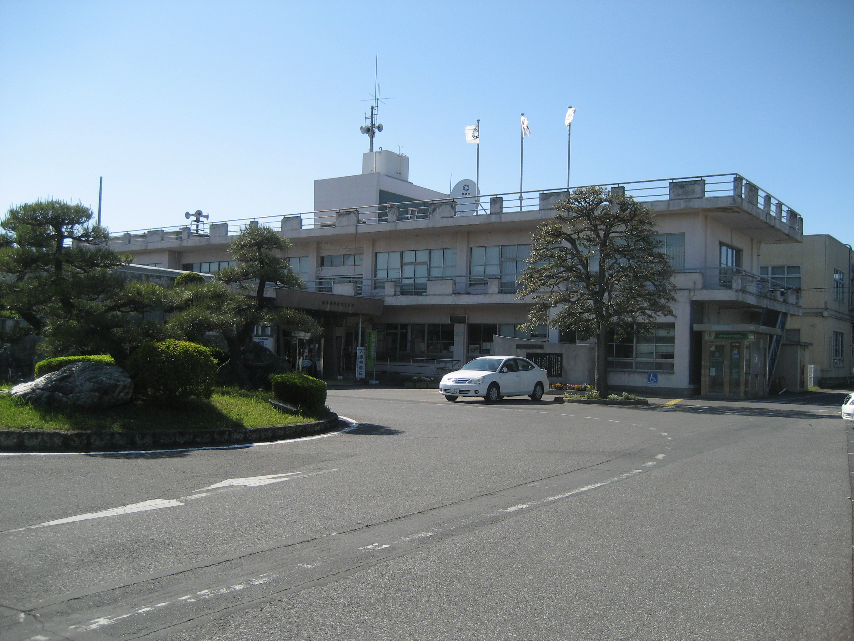 埼玉県北本市役所庁舎